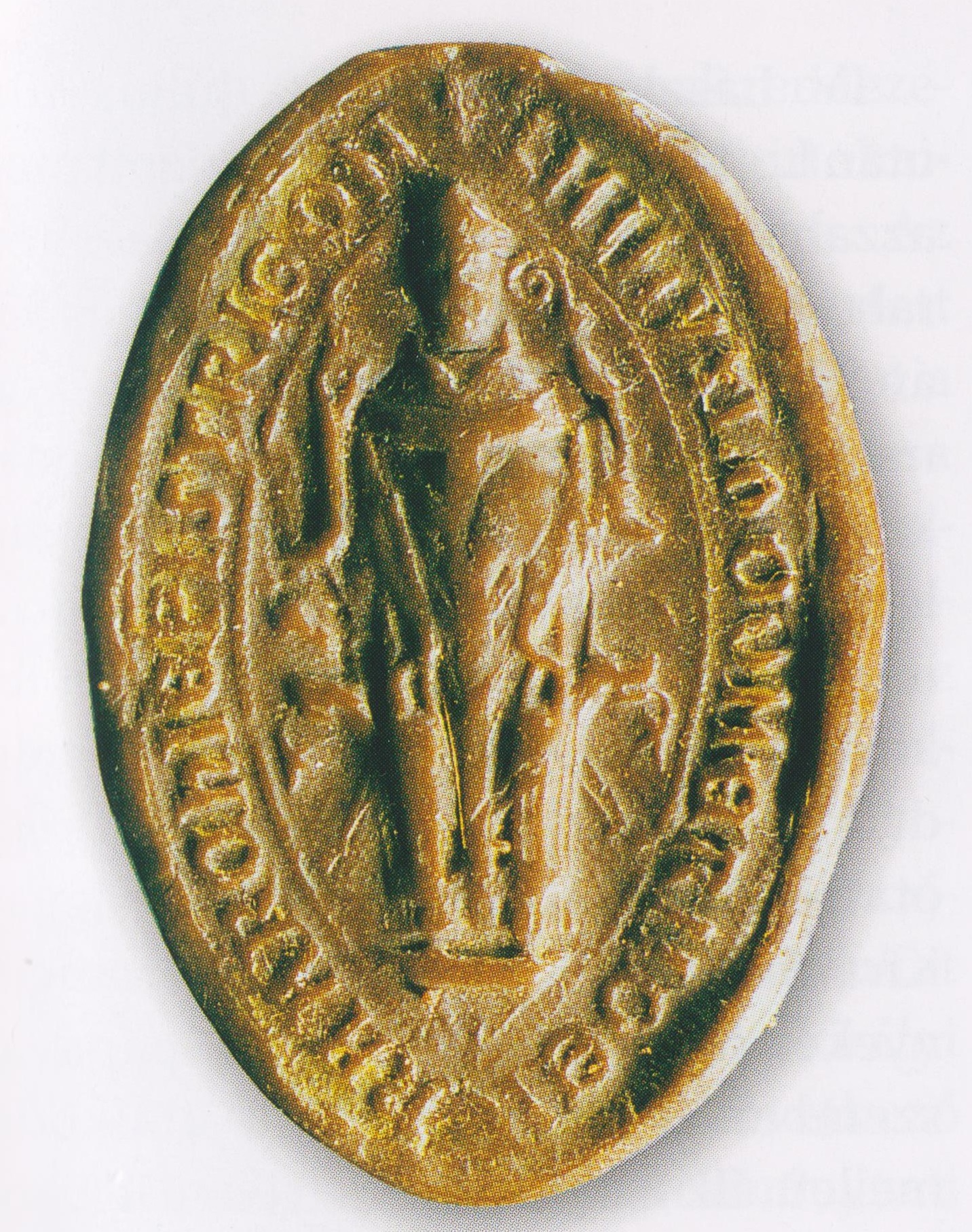 Lodomér esztergomi érsek pecsétje